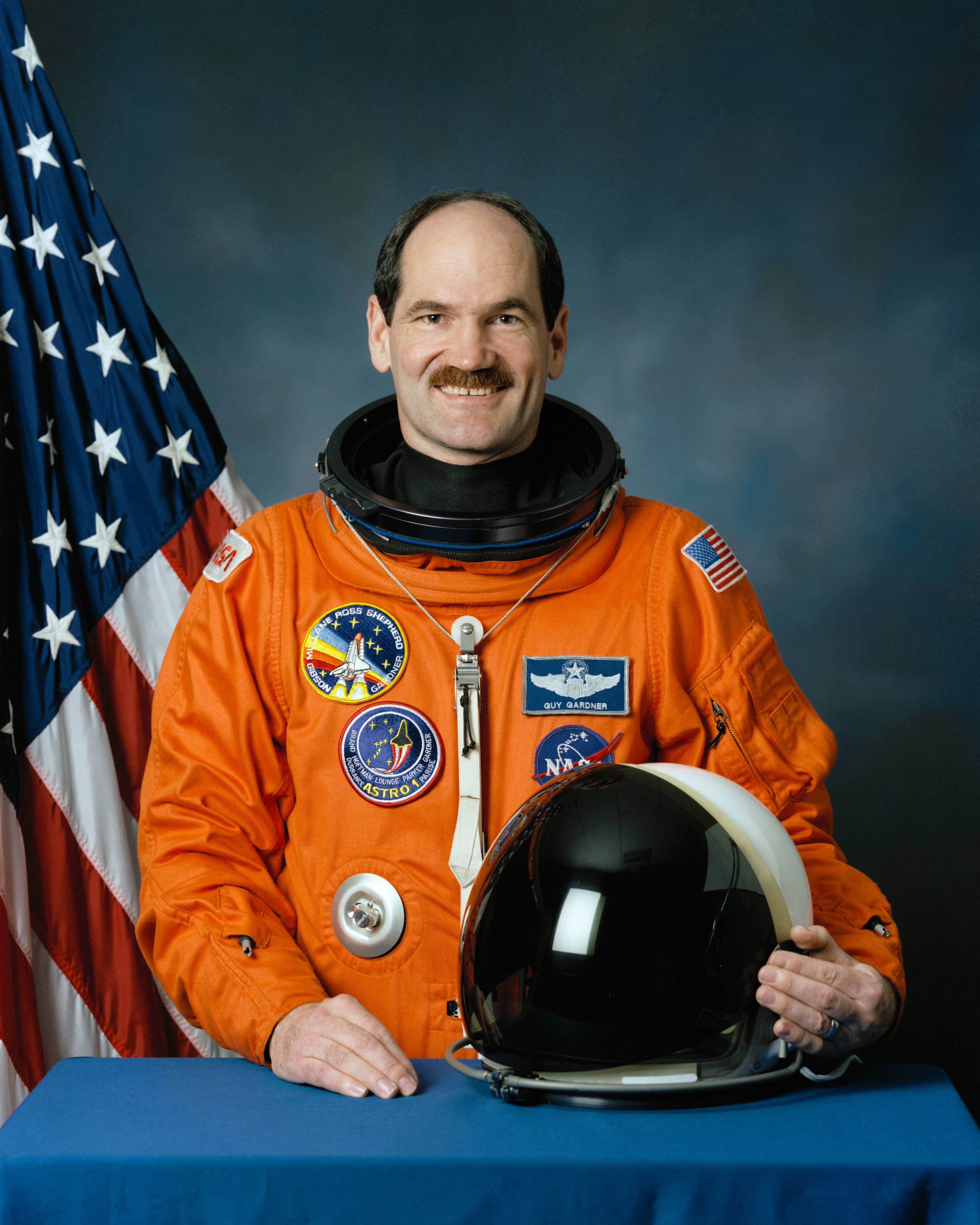 Guy S. Gardner, NASA Astronaut (former)